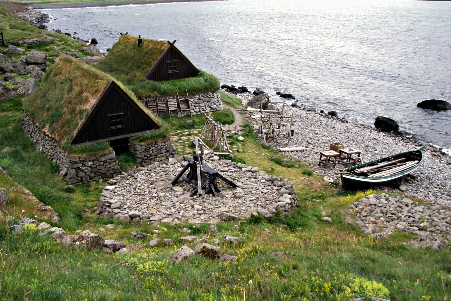 Ósvör Fishing Museum at Bolungarvik, Iceland